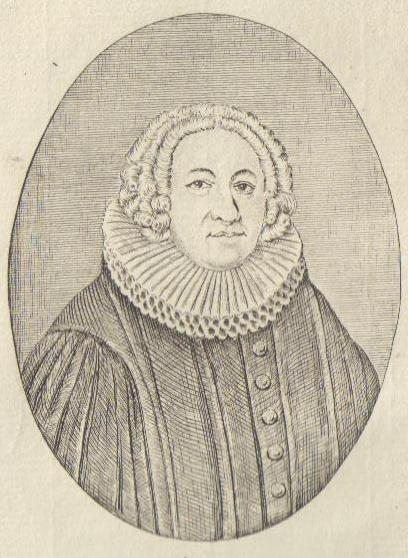 H.A. Brorson, ståltrykk Offentleg eigedom - opphavsmannen døydde for meir enn 70 år sidan